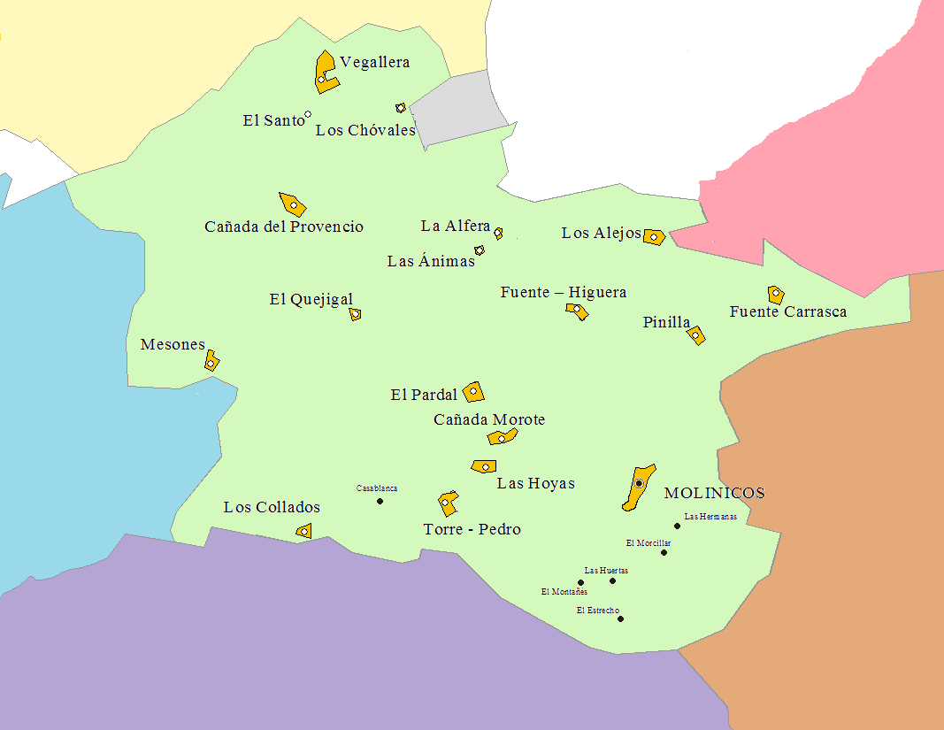 Mapa con las localidades que conforman el municipio de Molinicos (Albacete)